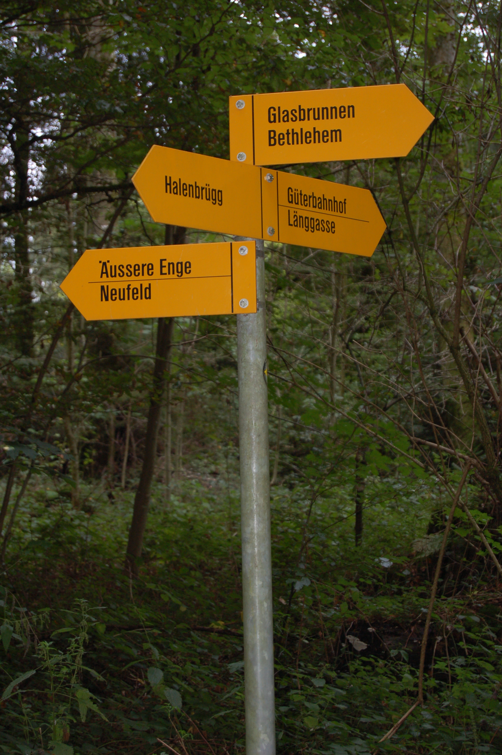 Wegweiser zum Glasbrunne im Bremgartenwald Bern, Schweiz